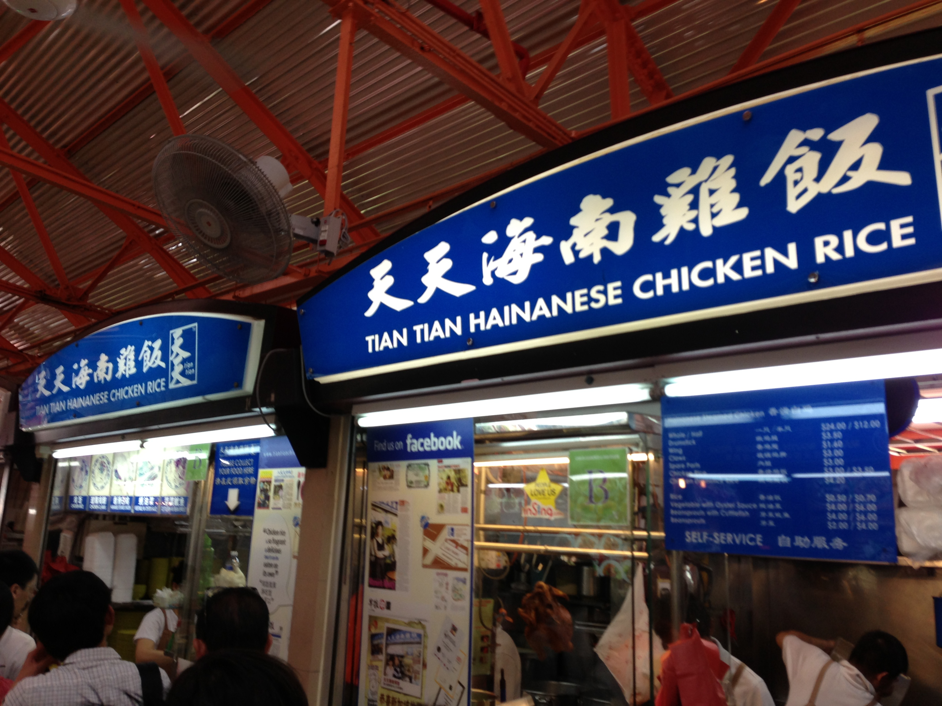 シンガポールのチキンライス有名店天天海南鶏飯